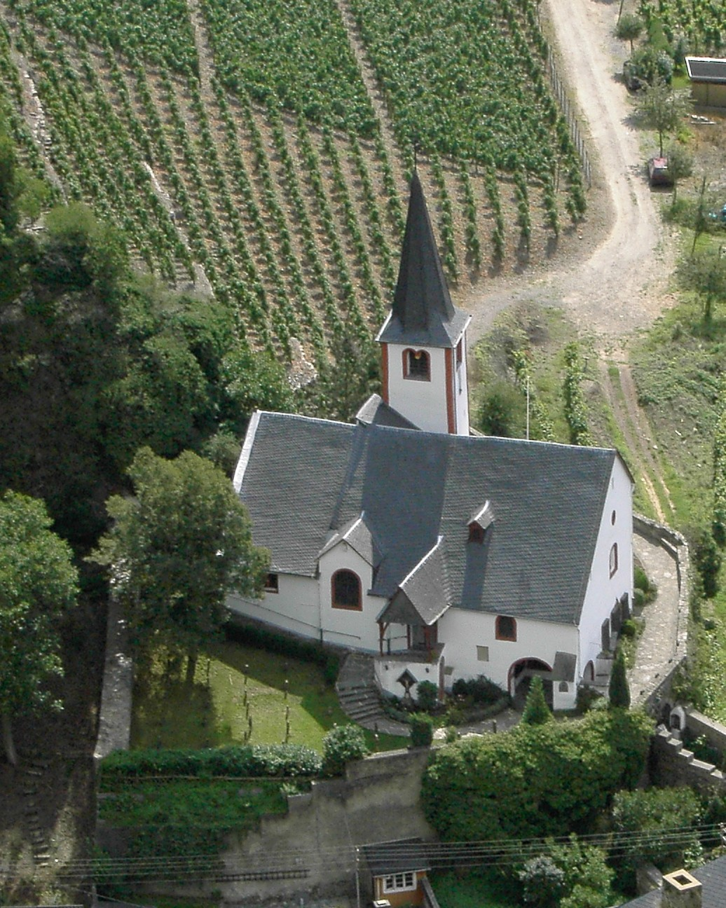 Michaelskapelle in Alken (Mosel) vom Oberfeller Bleidenberg aus gesehen (selbst fotografiert / gemeinfrei) - Ausschnitt aus einem größeren Foto